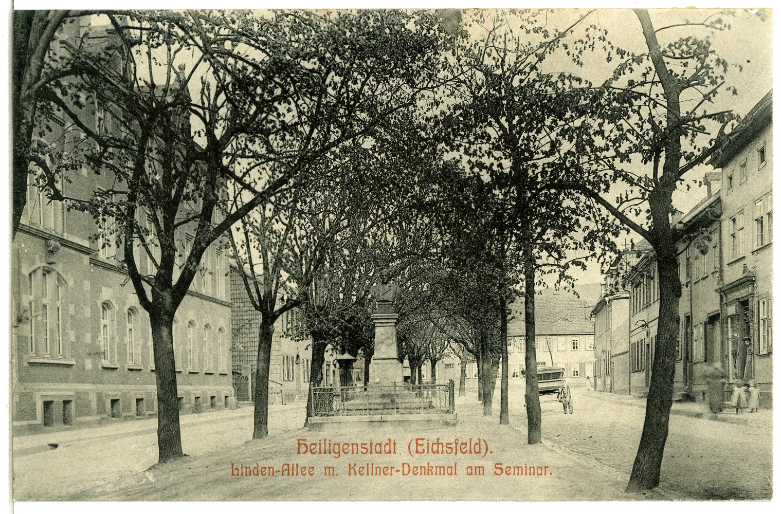 Heiligenstadt; Lindenallee mit Kellnerdenkmal am Seminar This postcard is from publisher Brück & Sohn in Meißen ( postcard has a unique number 07166 and is available in a higher resolution at the publisher. This images was uploaded in a cooperation project between Wikipedians and the publisher.